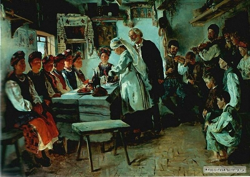 Владимир Маковский. Девичник. 1882